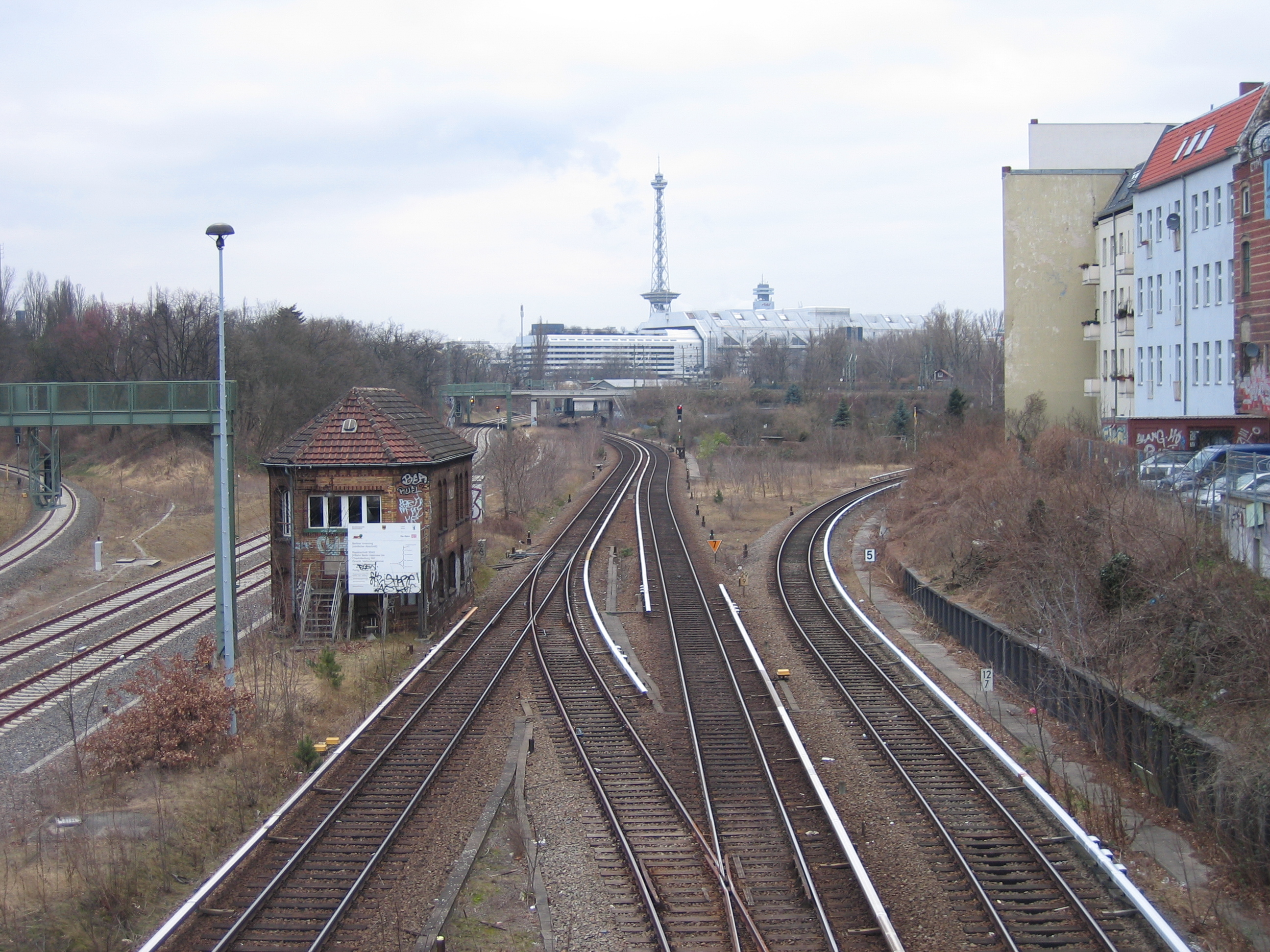 Der Berliner S-Bahn-Ring nahe dem Bahnhof Halensee: Stellwerk, rechts die Südringkurve